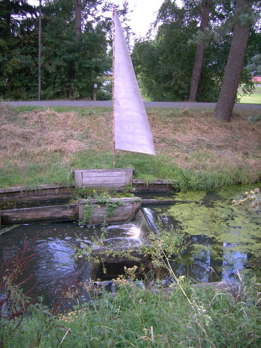 Klappstau am Oste-Hamme-Kanal bei Findorf, Gemeinde Gnarrenburg, Landkreis Rotenburg (Wümme)